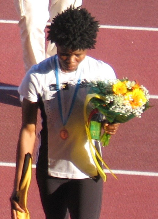 Seyi Omojuwa Kalevan kisoissa, Ratinan stadionilla, Tampereella, 26. heinäkuuta 2008